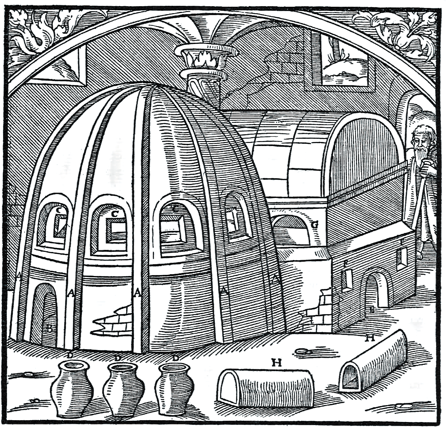 Georg Agricola, Zwölf Bücher vom Berg- und Hüttenwesen, übers. v. Carl Schiffner, Berlin 1928, S. 502 ff. Scanned by Bibliothek für Sozial- und Wirtschaftsgeschichte / Köln, rights released to the public domain. caption:"Die Bögen des zweiten Ofens A. Sein unteres Ofenloch B. Die Fenster der oberen Kammer C. Die bauchigen Gefäße D. Das Ofenloch des dritten Ofens E. Raum für die Aufnahme der länglichen Behälter F. Öffnungen der oberen Kammer G. Die länglichen Behälter H."